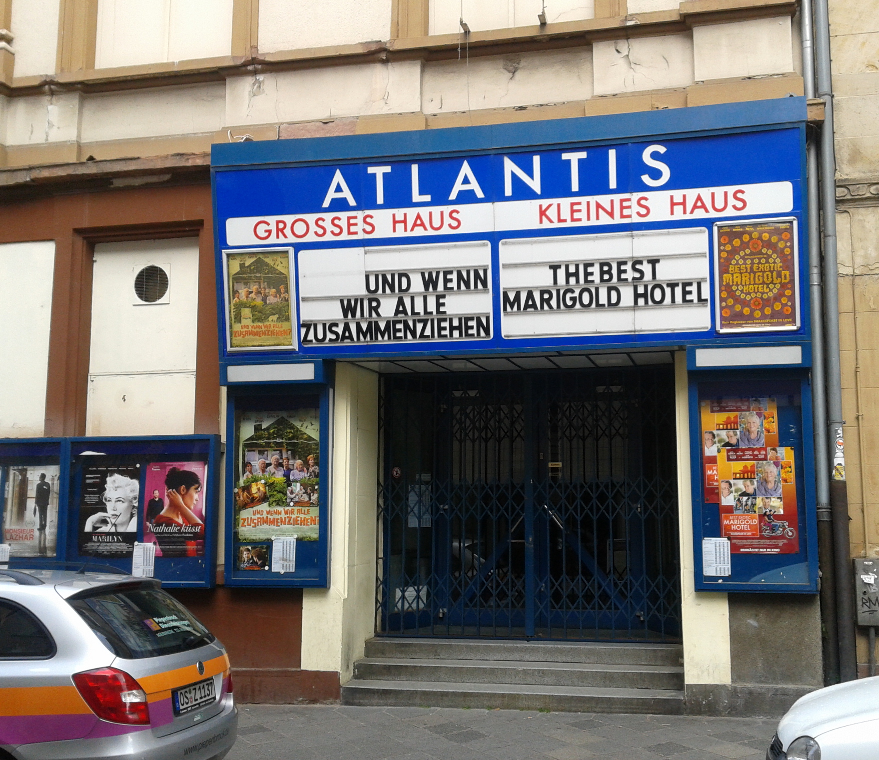 Programmkino Atlantis in Mannheim, K2, 32